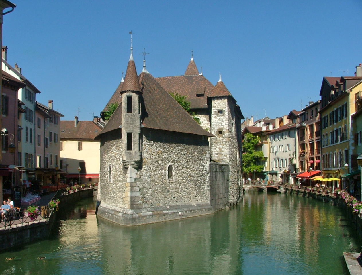 Palais de L'Isle in Annecy